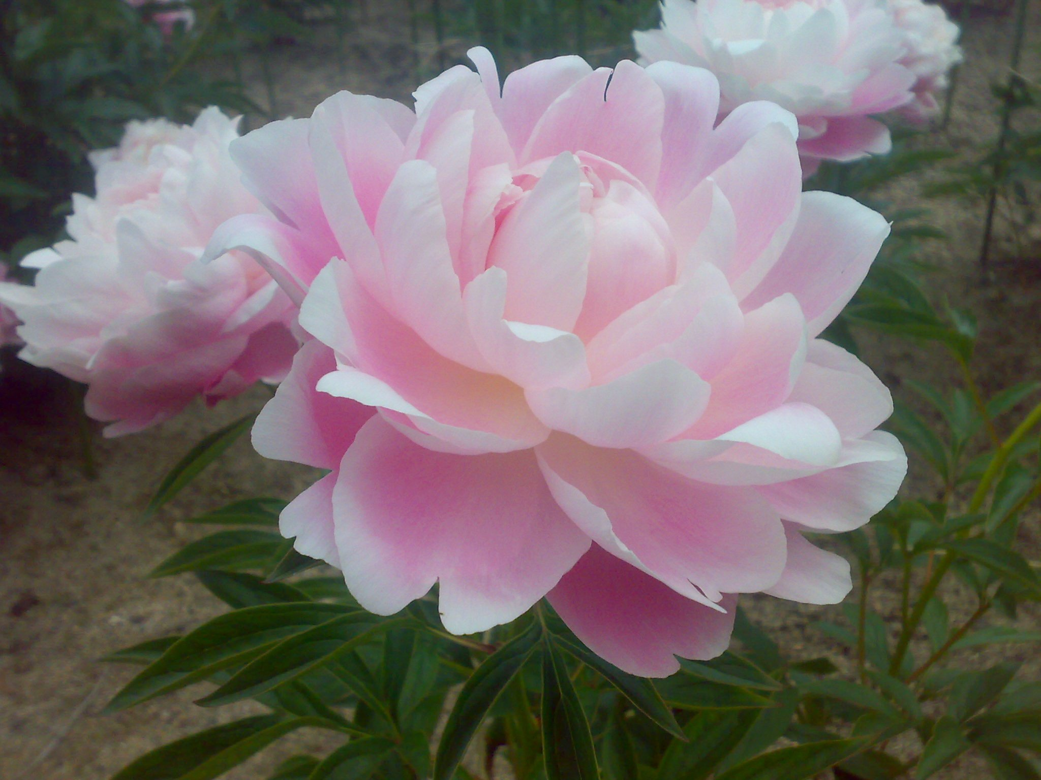 200905033163.jpg